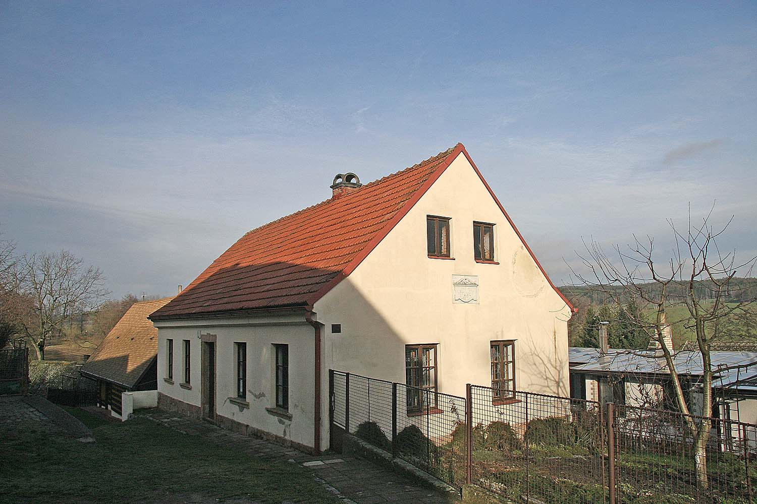 Miletín, okres Jičín. Rodný dům básníka Karla Jaromíra Erbena.